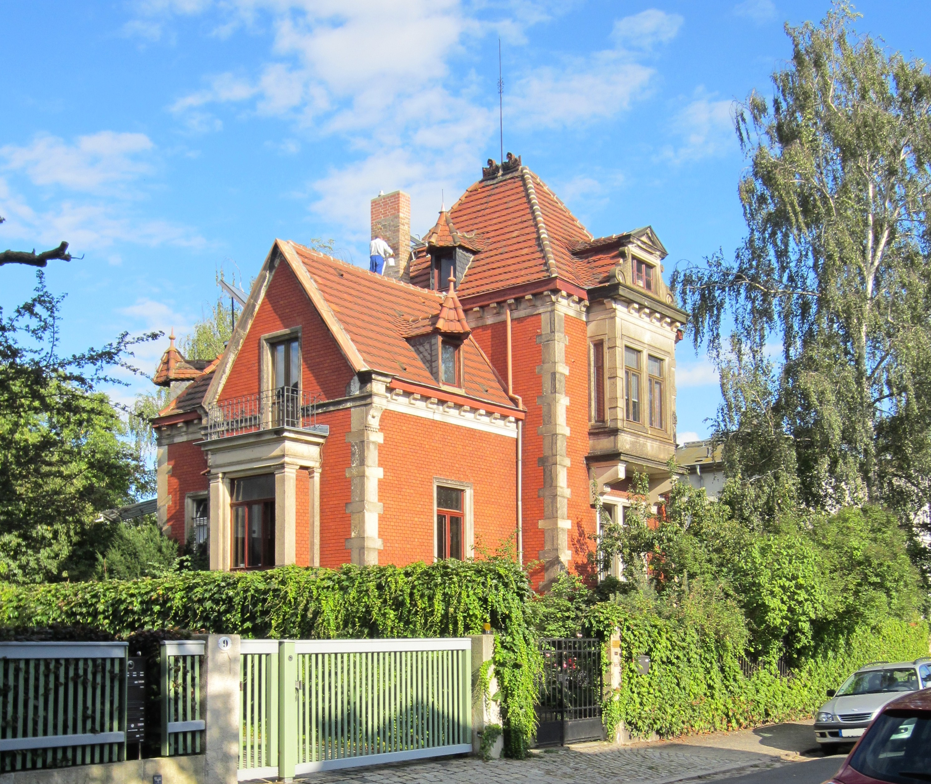 Denkmalgeschütztes Wohnhaus in Blasewitz (Dresden), Scariastraße 11